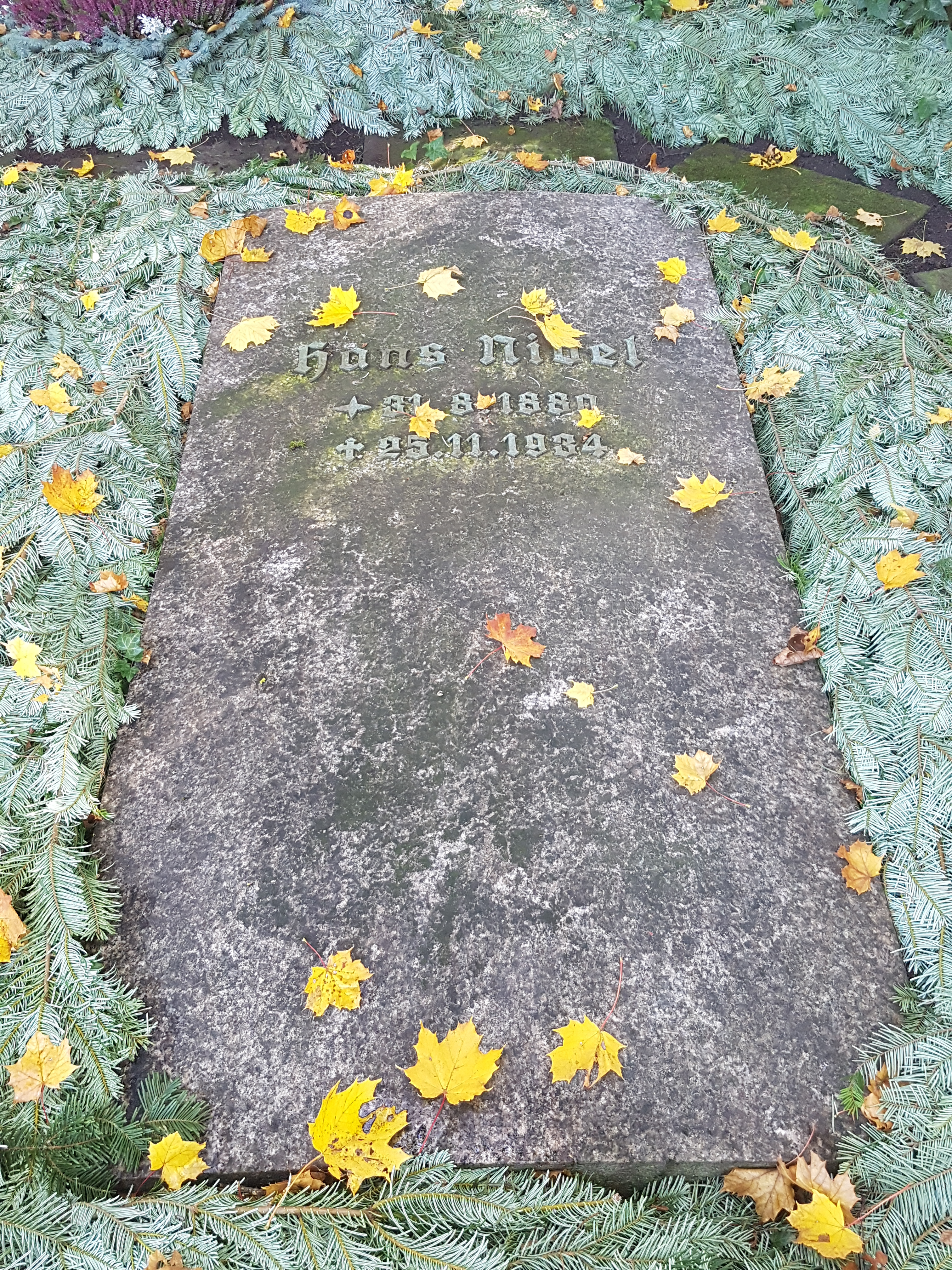 Grabstätte für Hans Nibel auf dem Stuttgarter Pragfriedhof